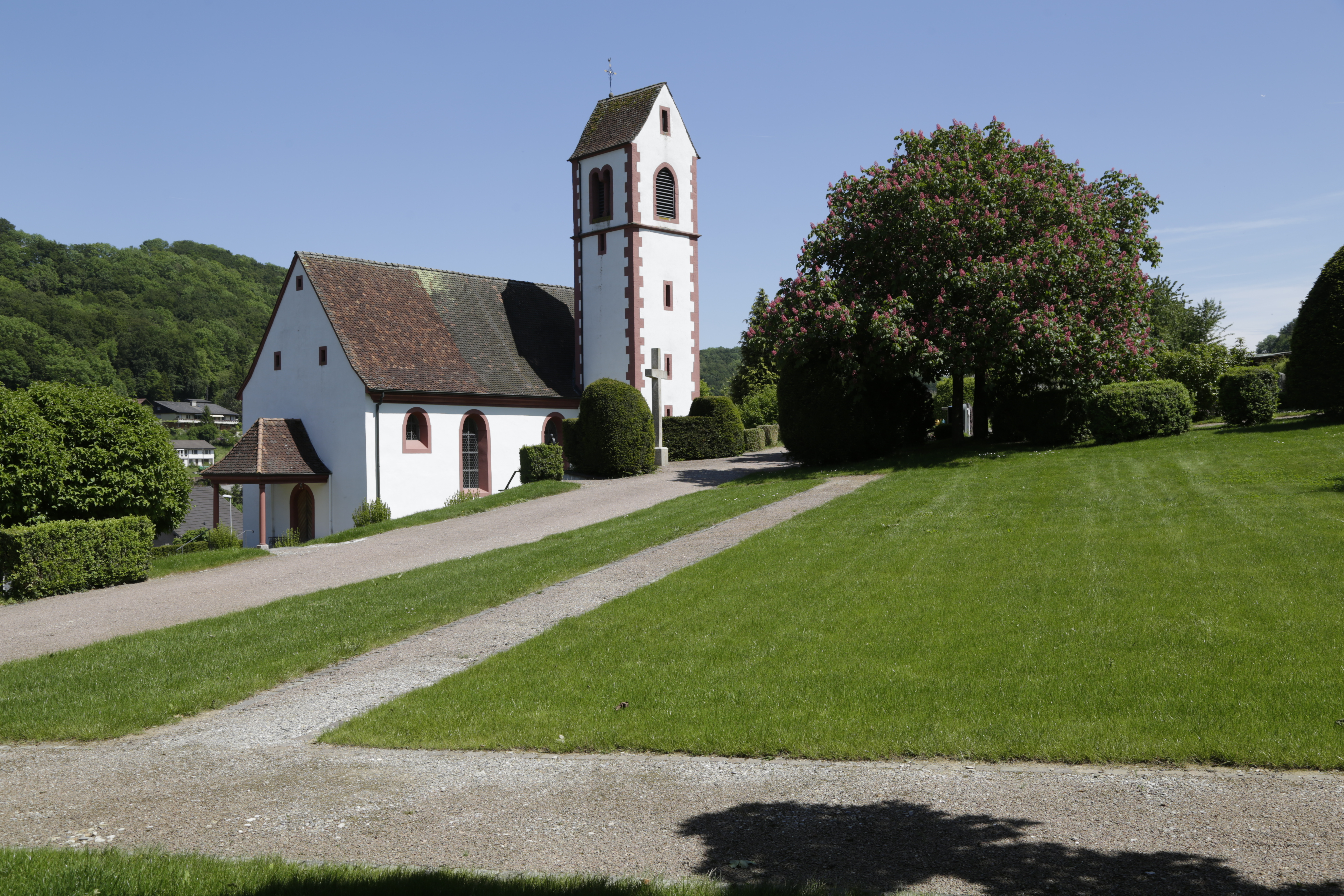 Der Blick vom Friedhof auf die christkatholische Kirche von Obermumpf.